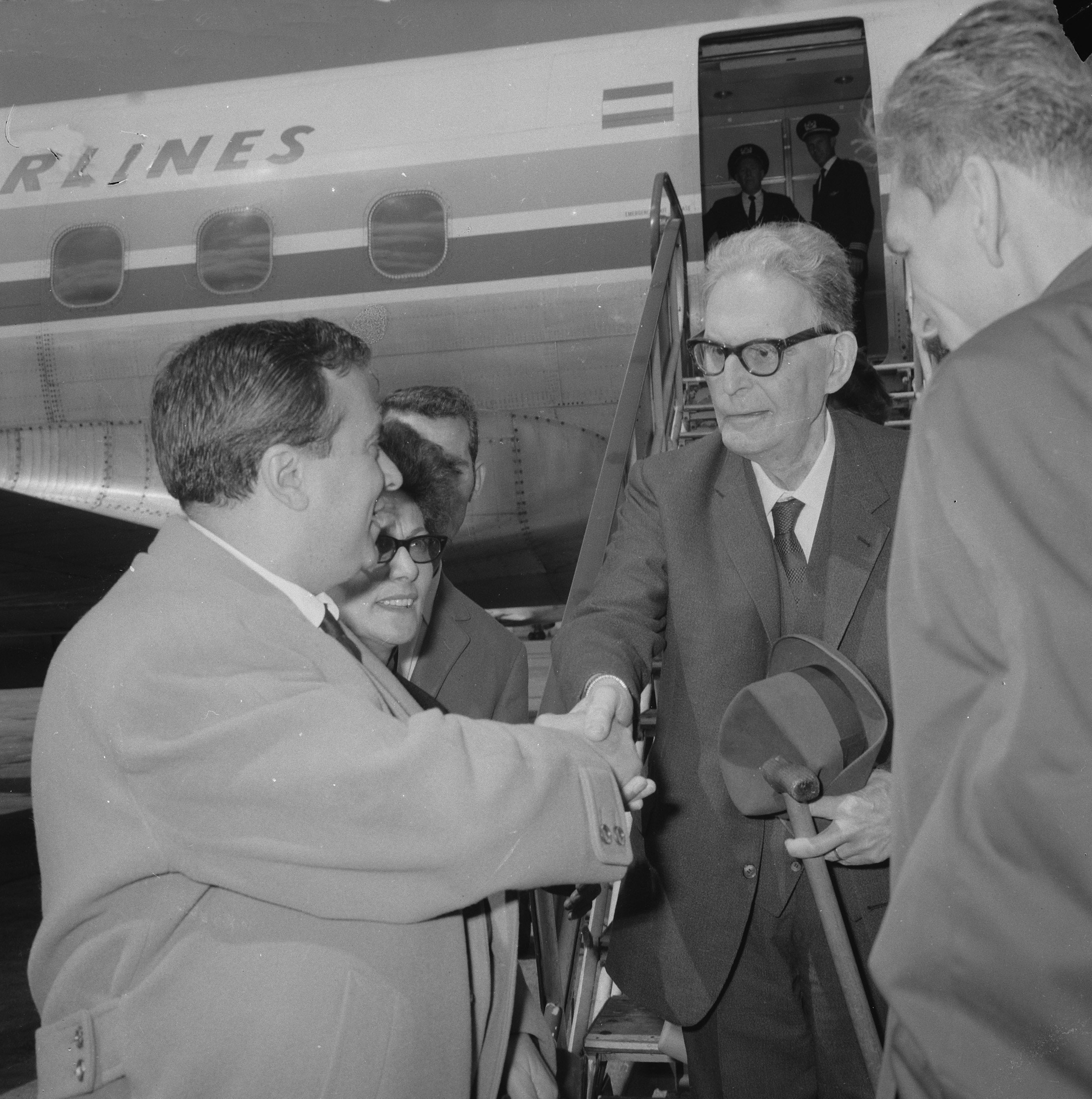 Collectie / Archief : Fotocollectie Anefo Reportage / Serie : [ onbekend ] Beschrijving : Aankomst Otto Klemperer (dirigent) op Schiphol, Henryk Szeryng (violost) (links) begroet hem Datum : 1 juli 1964 Locatie : Noord-Holland, Schiphol Trefwoorden : aankomsten, dirigenten Persoonsnaam : Klemperer, Otto Fotograaf : Pot, Harry / Anefo Auteursrechthebbende : Nationaal Archief Materiaalsoort : Negatief (zwart/wit) Nummer archiefinventaris : bekijk toegang 2.24.01.03 Bestanddeelnummer : 916-6065